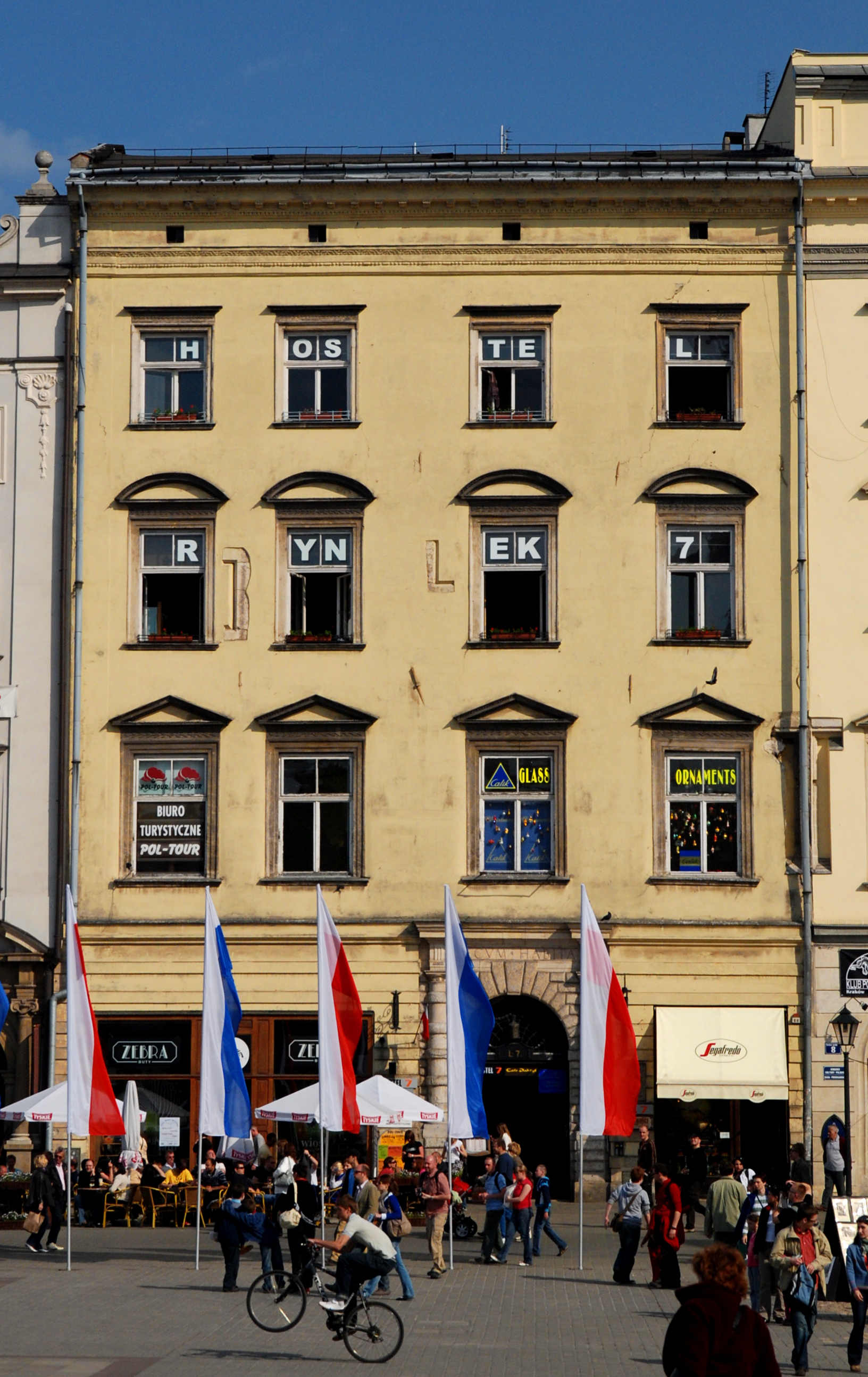 Dom Włoski (kamienica Montelupich). Rynek Główny nr 7, Kraków